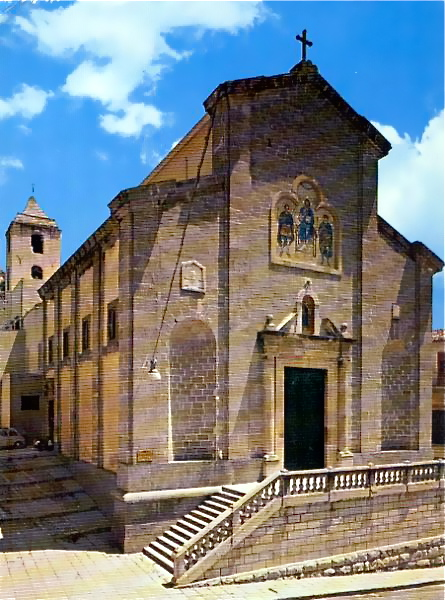 Cattedrale di Piana degli Albanesi, anni '70-'80 del '900.